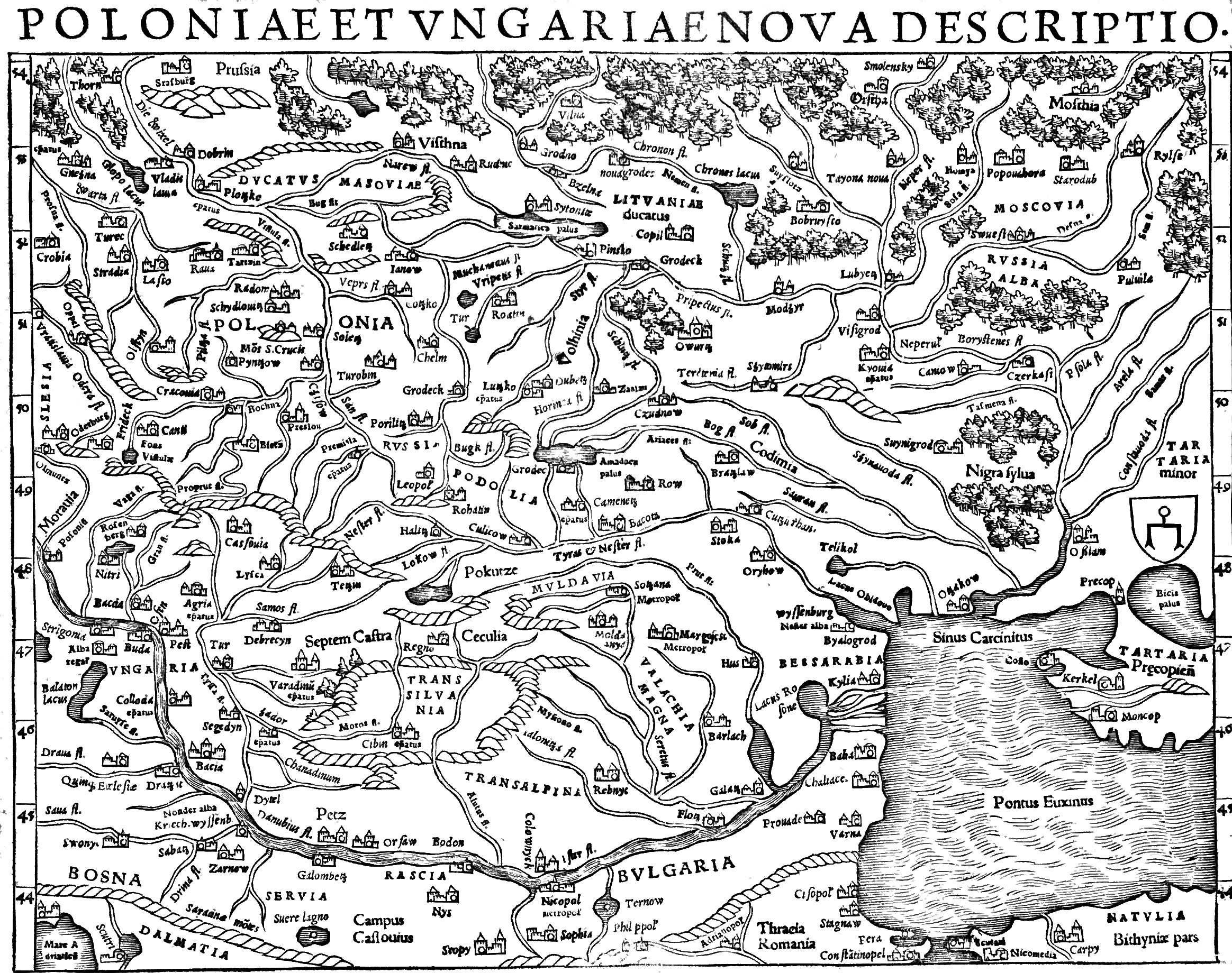 Poloniae et Ungariae, from the Cosmographia of Sebastian MünsterПольша и Венгрия, из космографии Себастьяна Мюнстера.